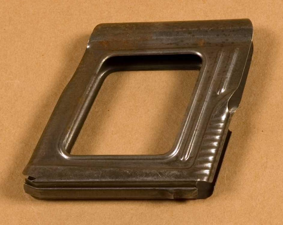 Okvirček za prvo puško manliherico (M1885).